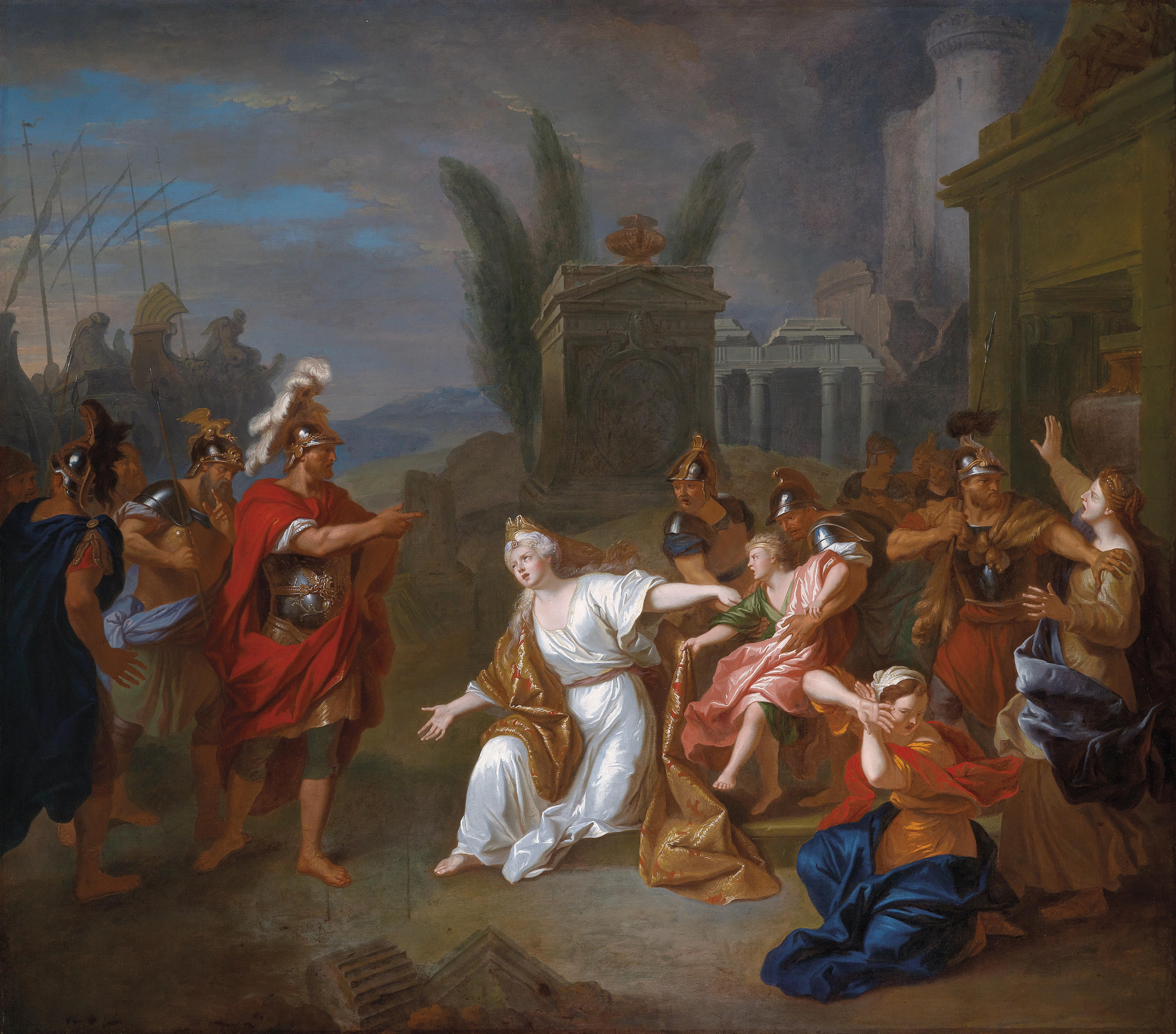 Odysseus verlangt von Andromache den Knaben Astyanax, Öl auf Leinwand, 153,5 x 175,5 cm (1708 für den Erzbischof von Straßburg Kardinal de Rohan gemalt mit dem Gegenstück Abschied Hektors von Andromache, später Familiensitz der Rohan in Schloß Sichrow in Böhmen, im 19. Jh. in den Kunsthandel gelangt)